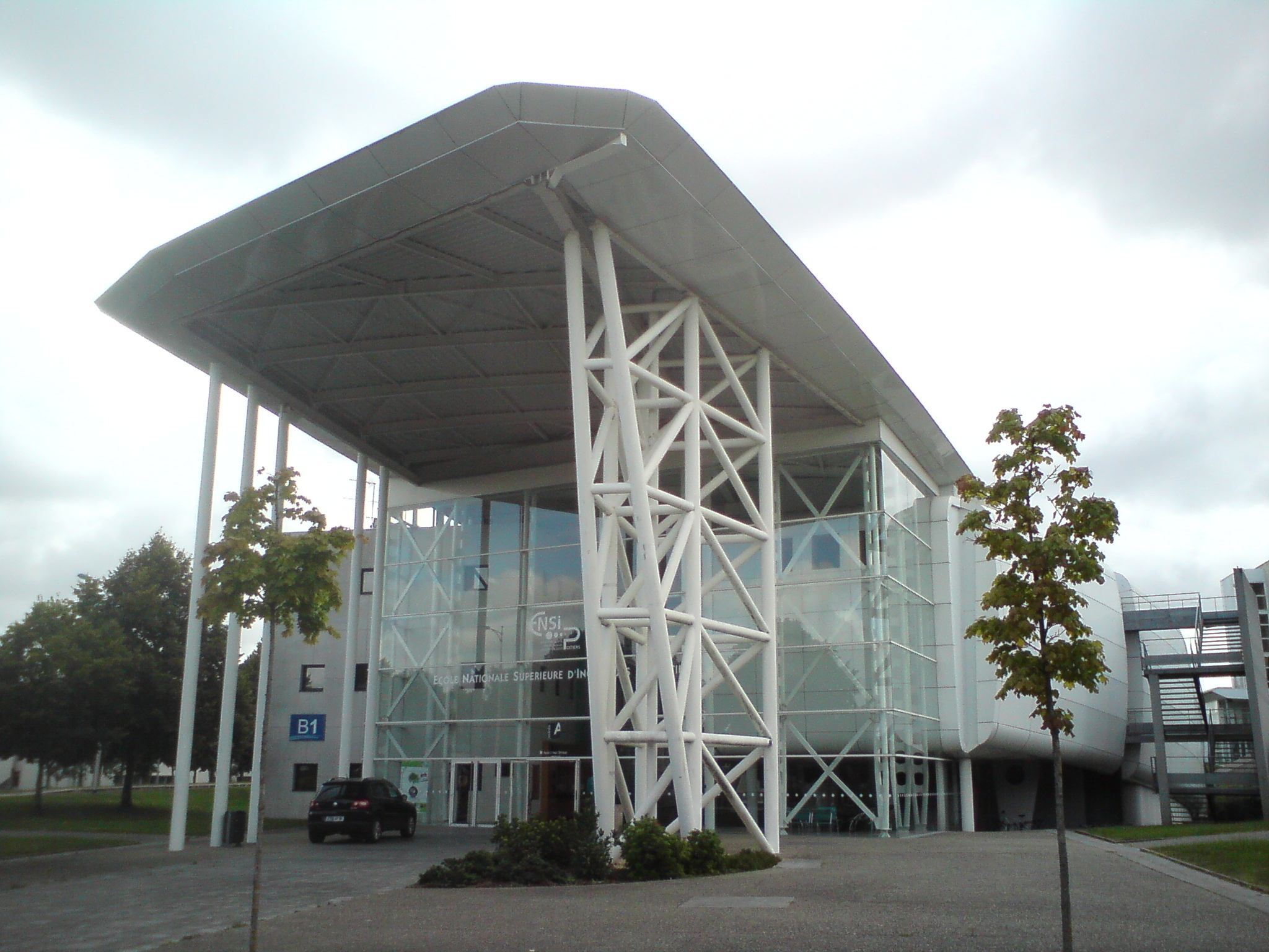 Ceci est le bâtiment de l'ENSIP de Poitiers vu de face